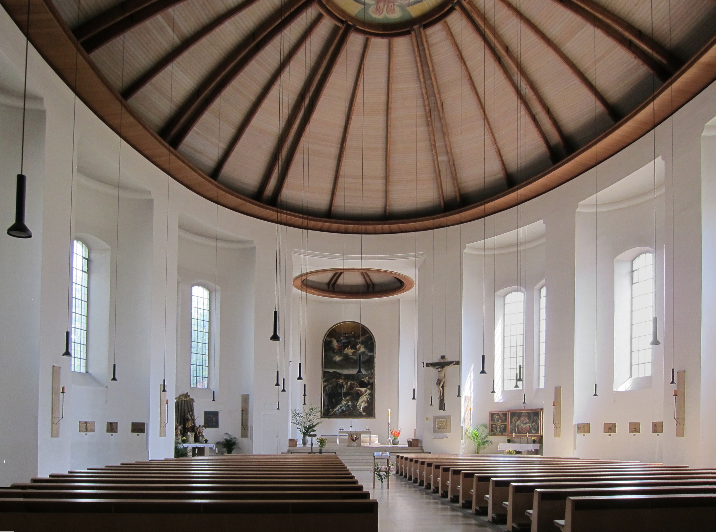 Kath. Pfarrkirche Christkönig, Nymphenburg